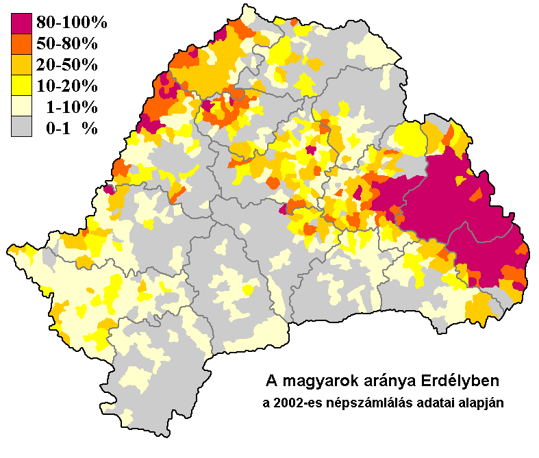 A magyarok aránya Erdélyben a 2002-es népszámlálás adatai alapján (község és város szintjén)